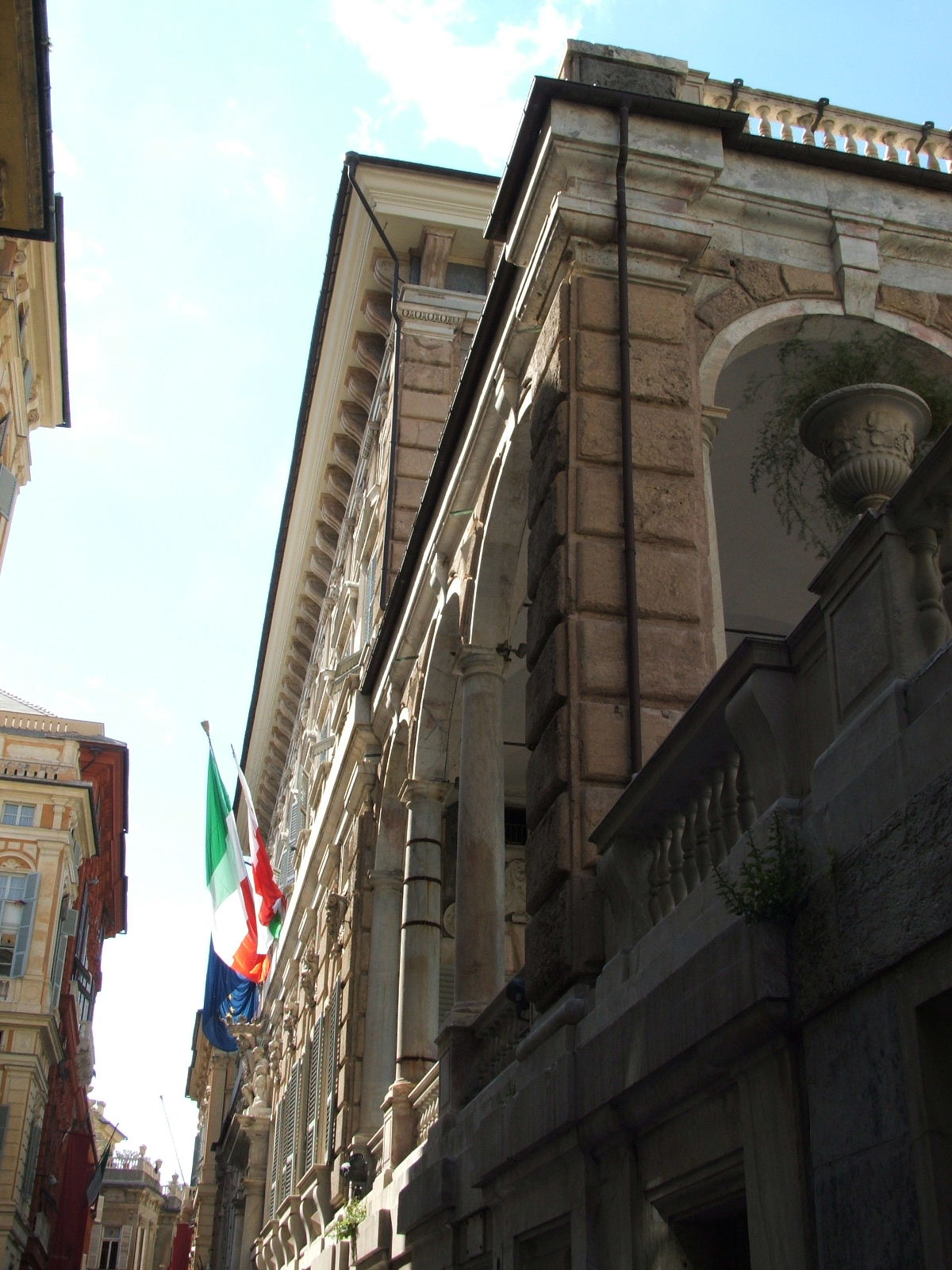 Genova, Via Garibaldi Palazzo Doria Tursi con uno dei due giardini pensili